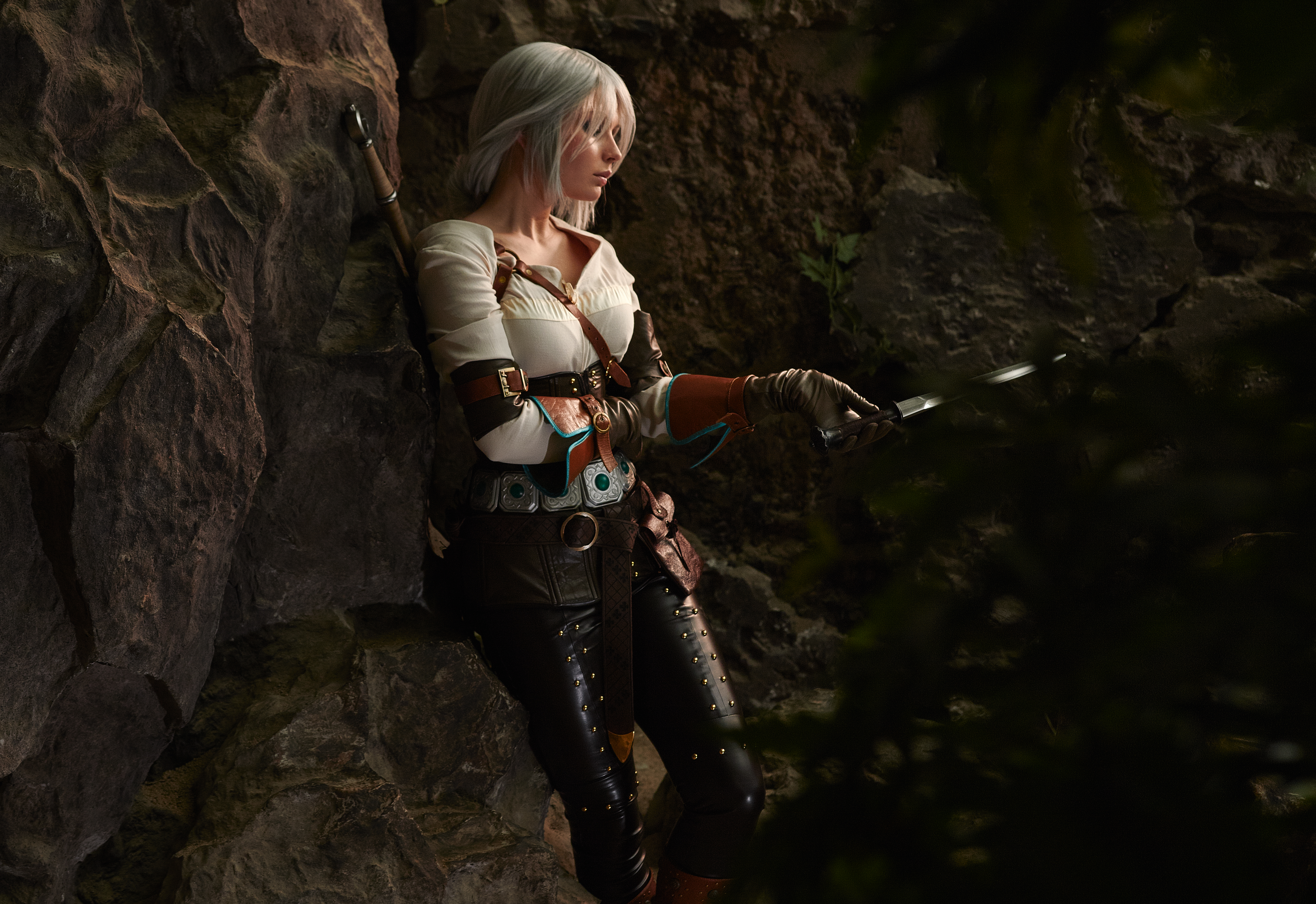 Ciri Cosplay (The Witcher 3 Wild Hunt)